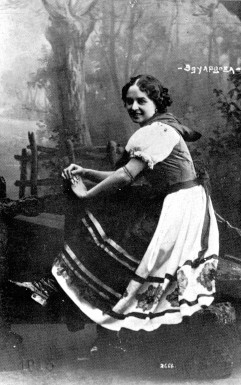 Die Tänzerin Eugenie Eduardowa (1882-1960) im Jahr 1913, zur Zeit der ersten Tagebücher.